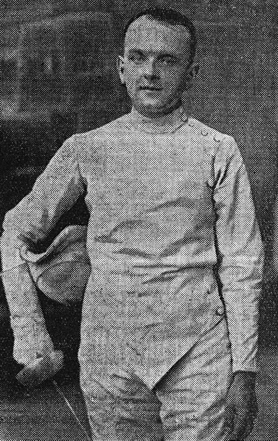 Michel Pécheux, champion du monde d'escrime à l'épée en 1938.